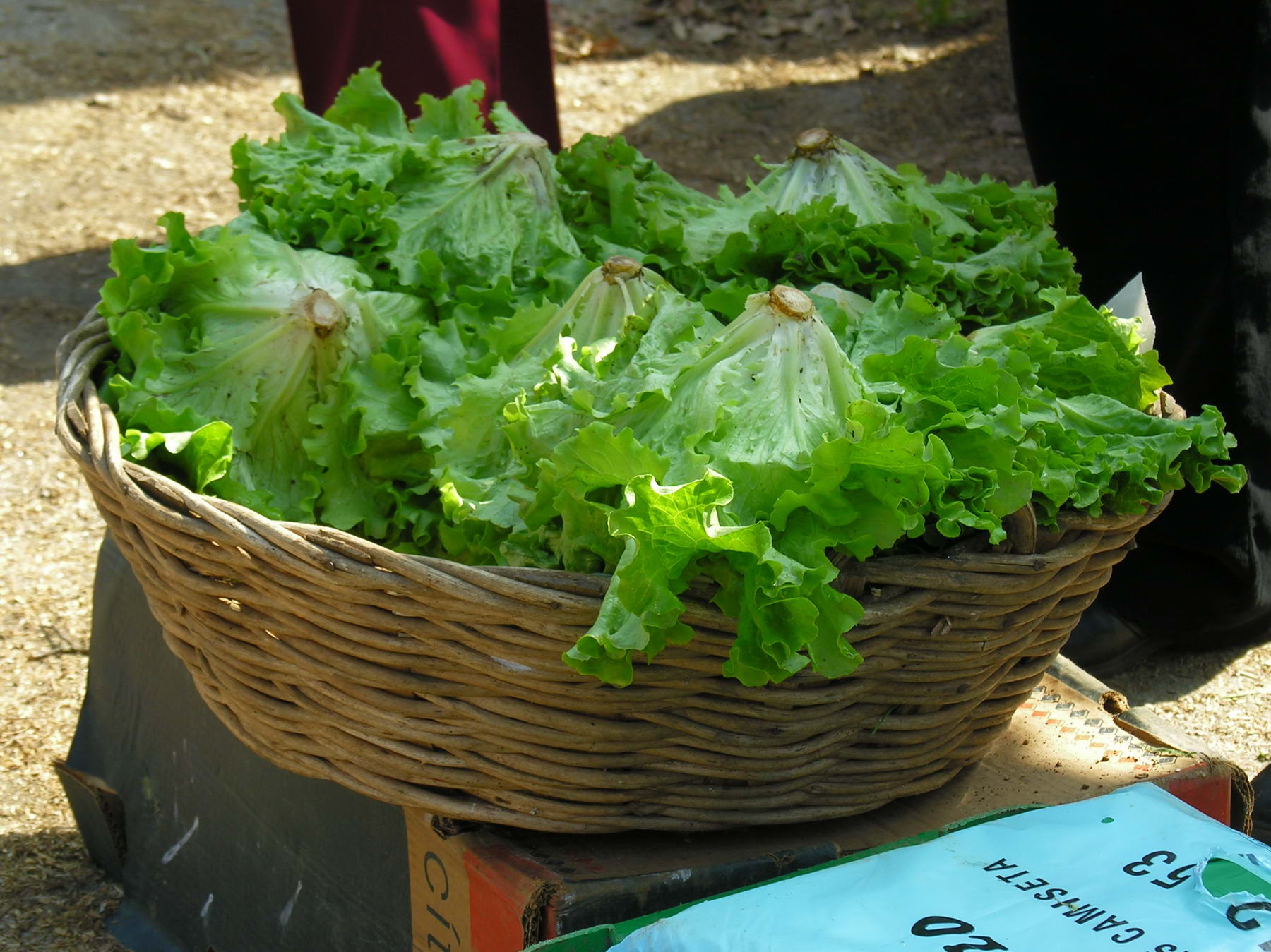 O Corpiño, Lalín, Galiza, Spain.